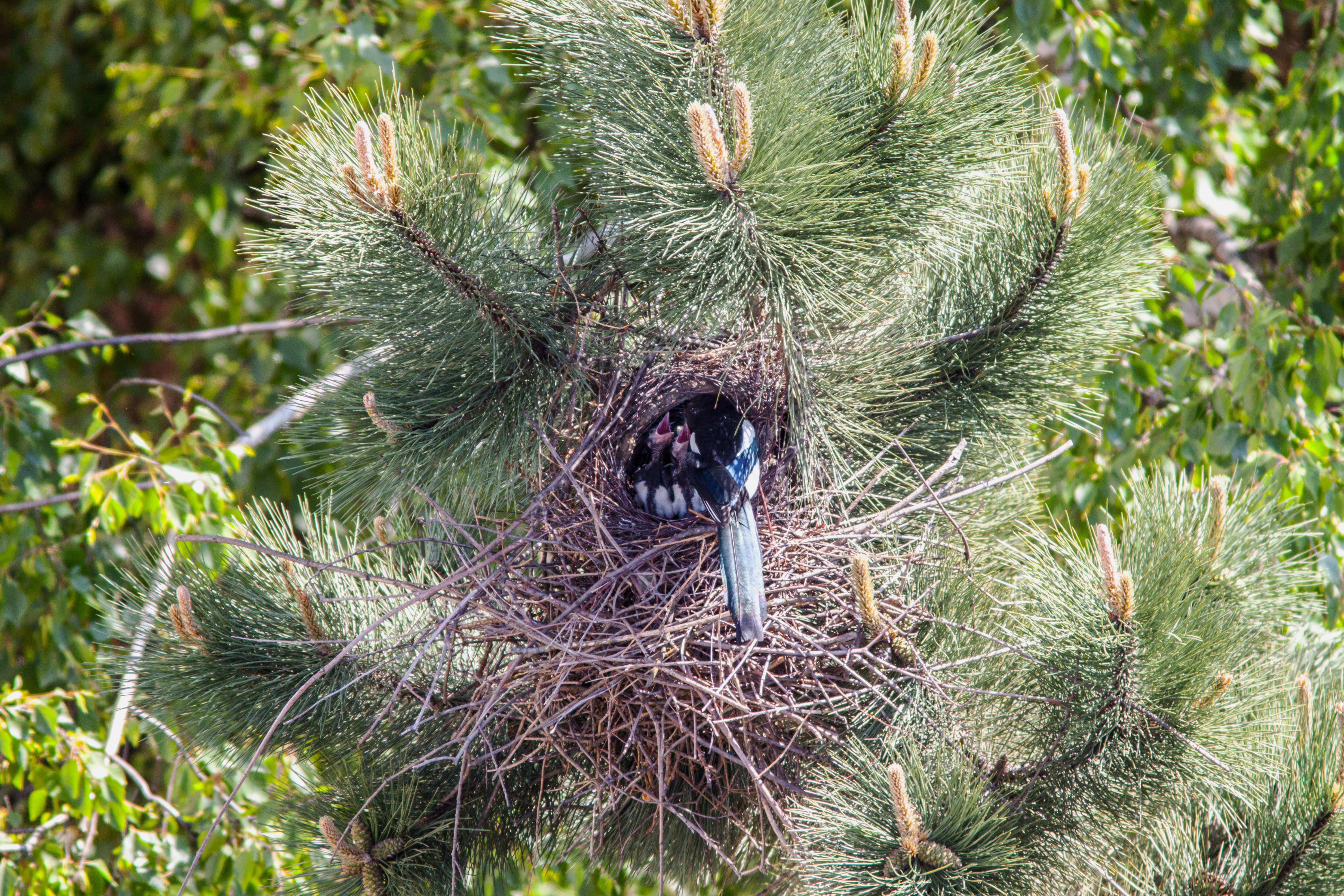 Gniazdo srok